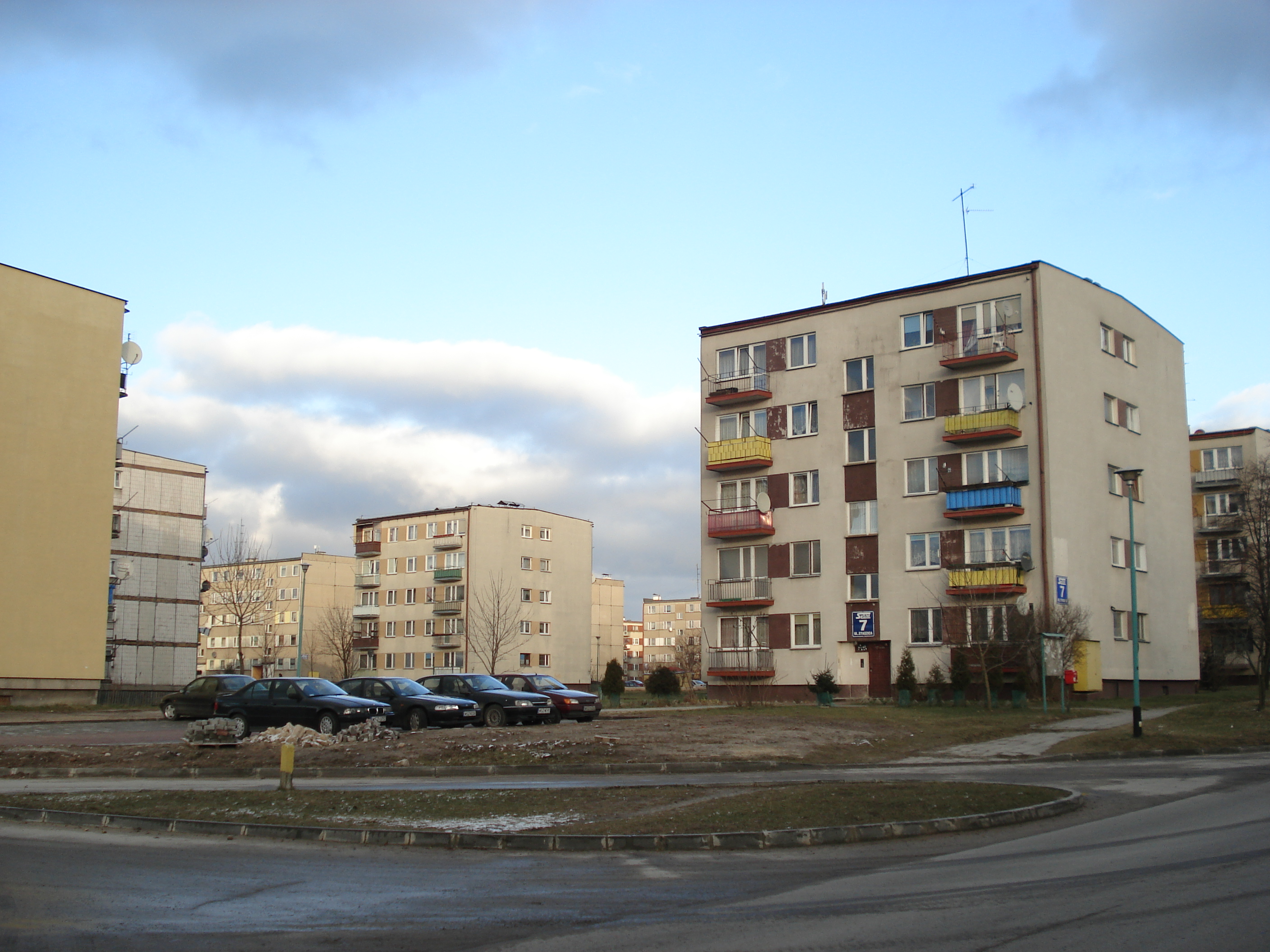 Fragment os. Wschód w Szydłowcu (sztajerki)